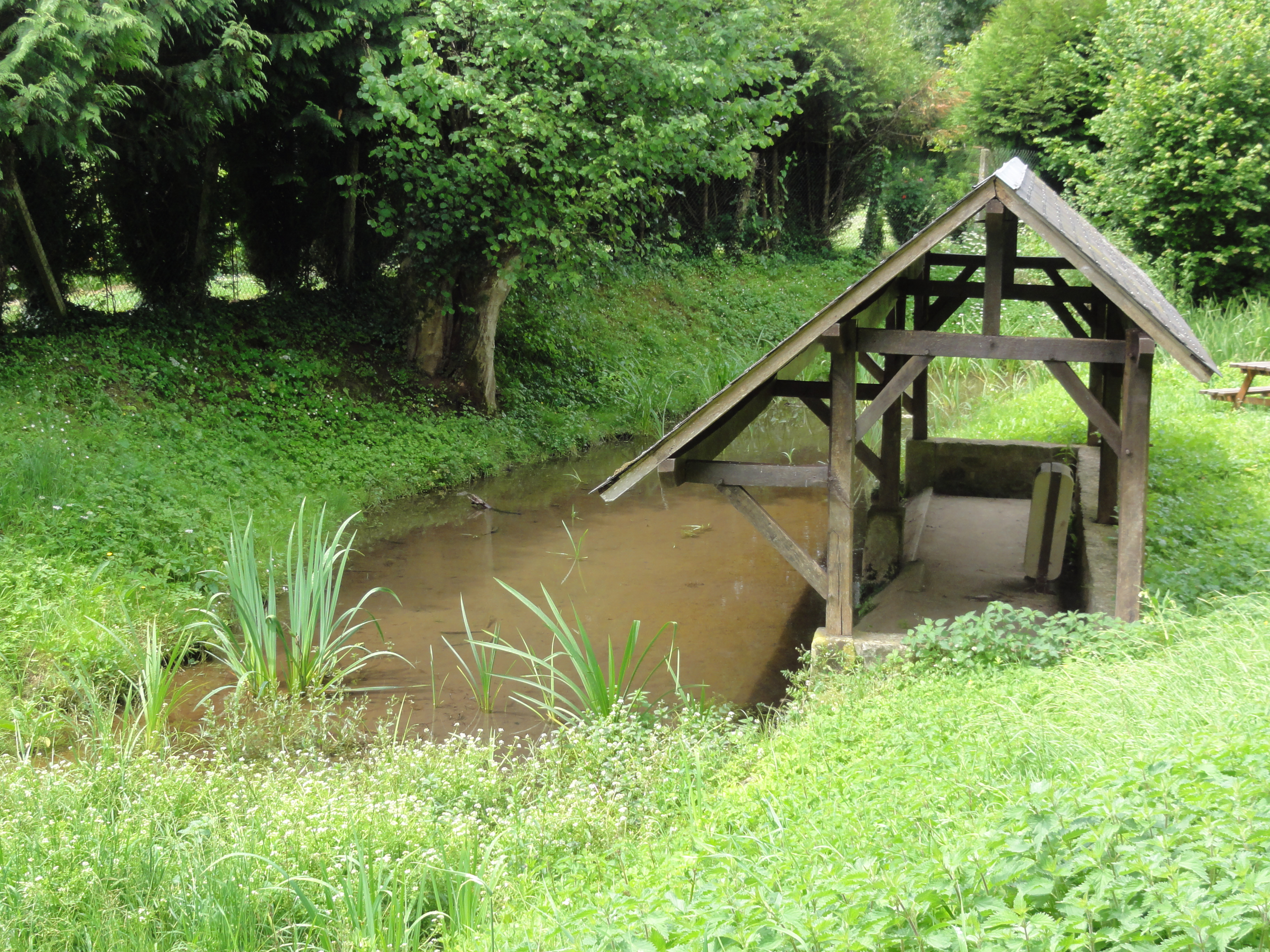 Saint-Épain (Indre-et-Loire) Lavoir